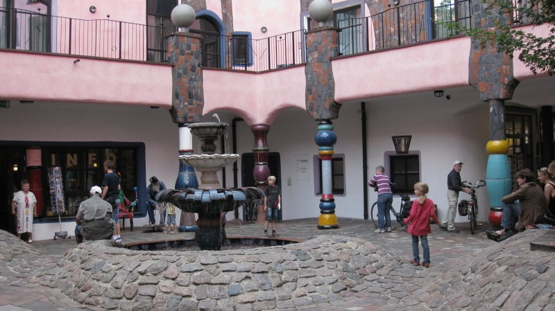 Auf dem Wege nach Dresden hatten wir die "Gruene Oase", ein Gebaeude mit dem der Name Hundertwasser verbunden ist aus der Ferne gesehen. Nichts wie hin ;-) . In der deutschen Wikipedia sind noch mehr Bilder von der "Gruenen Oase" zu finden .